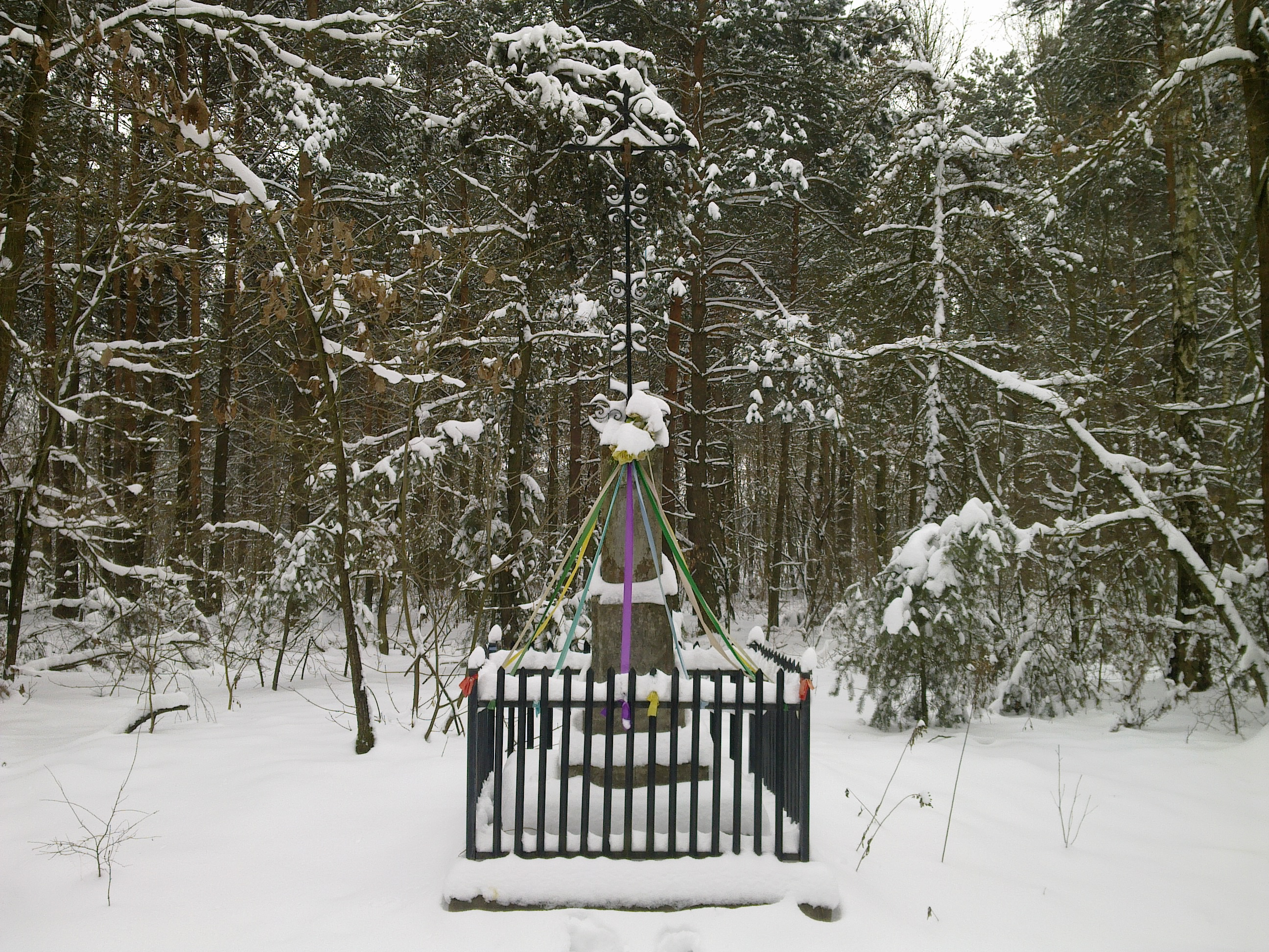 Krzyż postawiony przez J Kowalczyka w Świdnie